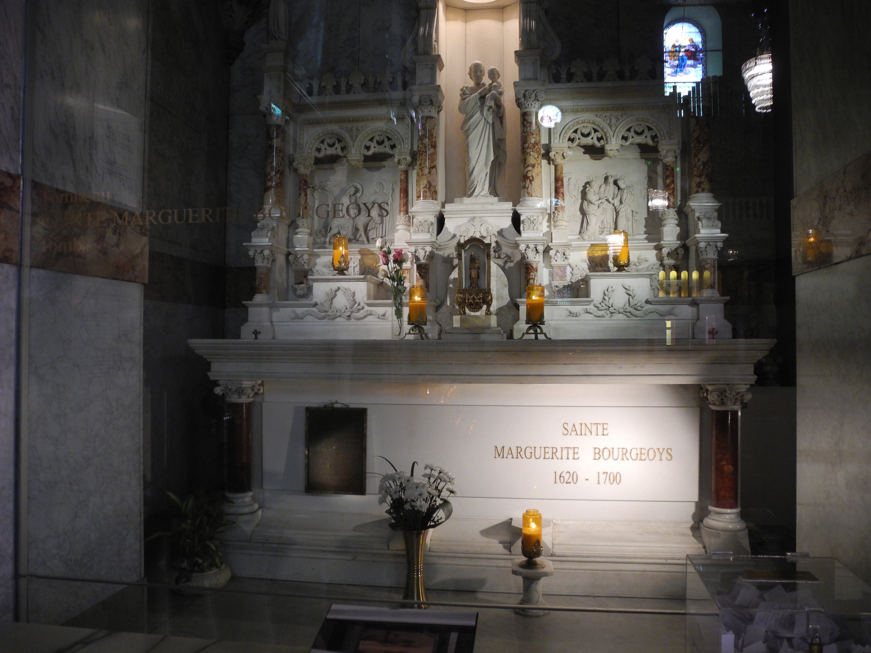 tombeau de Marguerite Bourgeoys, dans l'église ND de Bonsecours à Montréal